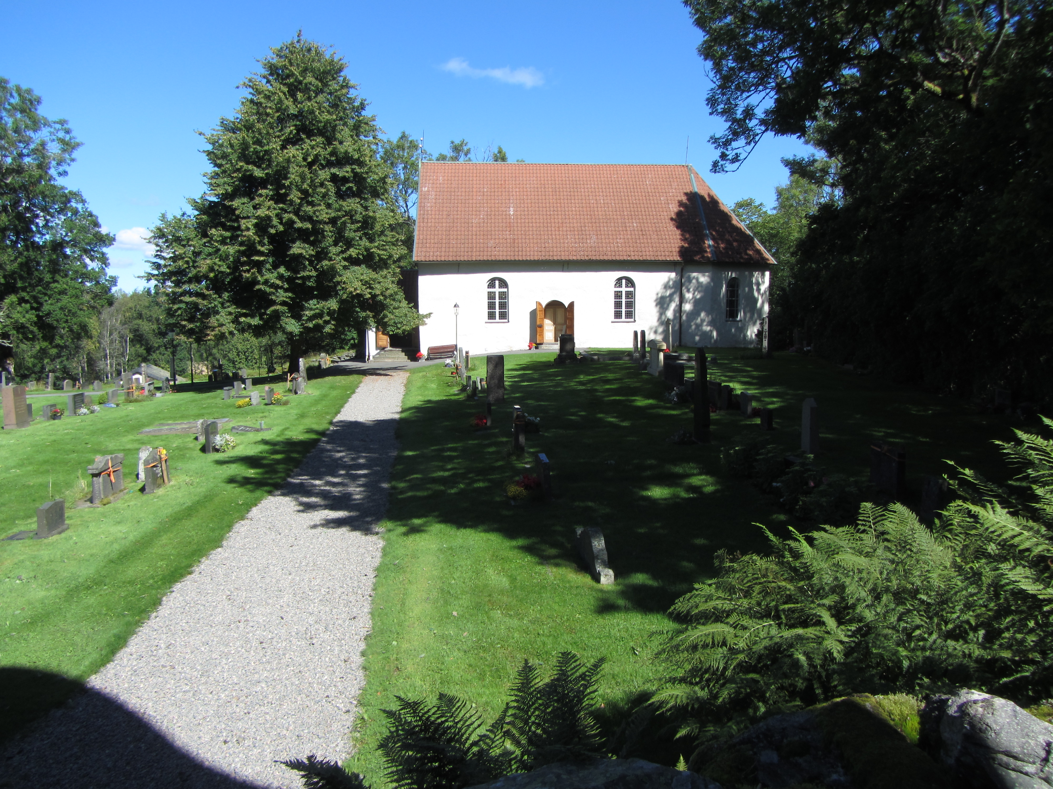 Torps kyrka och kyrkogård öster om Ellenö tätort och Ellenö kraftverk söder om Färgelanda i Dalsland.